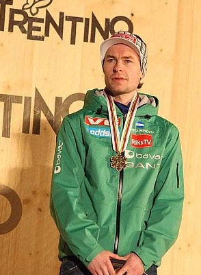 Dekoracja medalowa konkursu indywidualnego mężczyzn na skoczni K-120